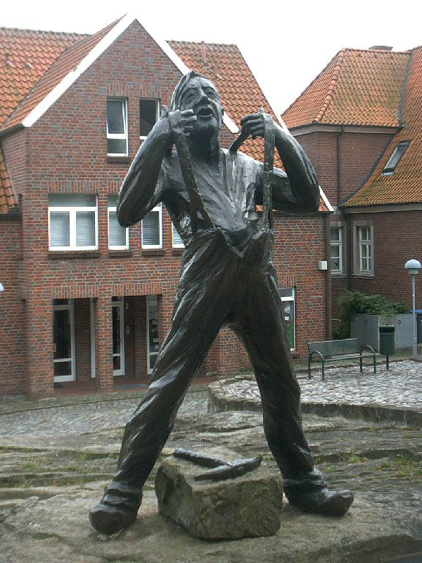 Skulptur Kuhlkerl, an der Burg von Bad Bentheim